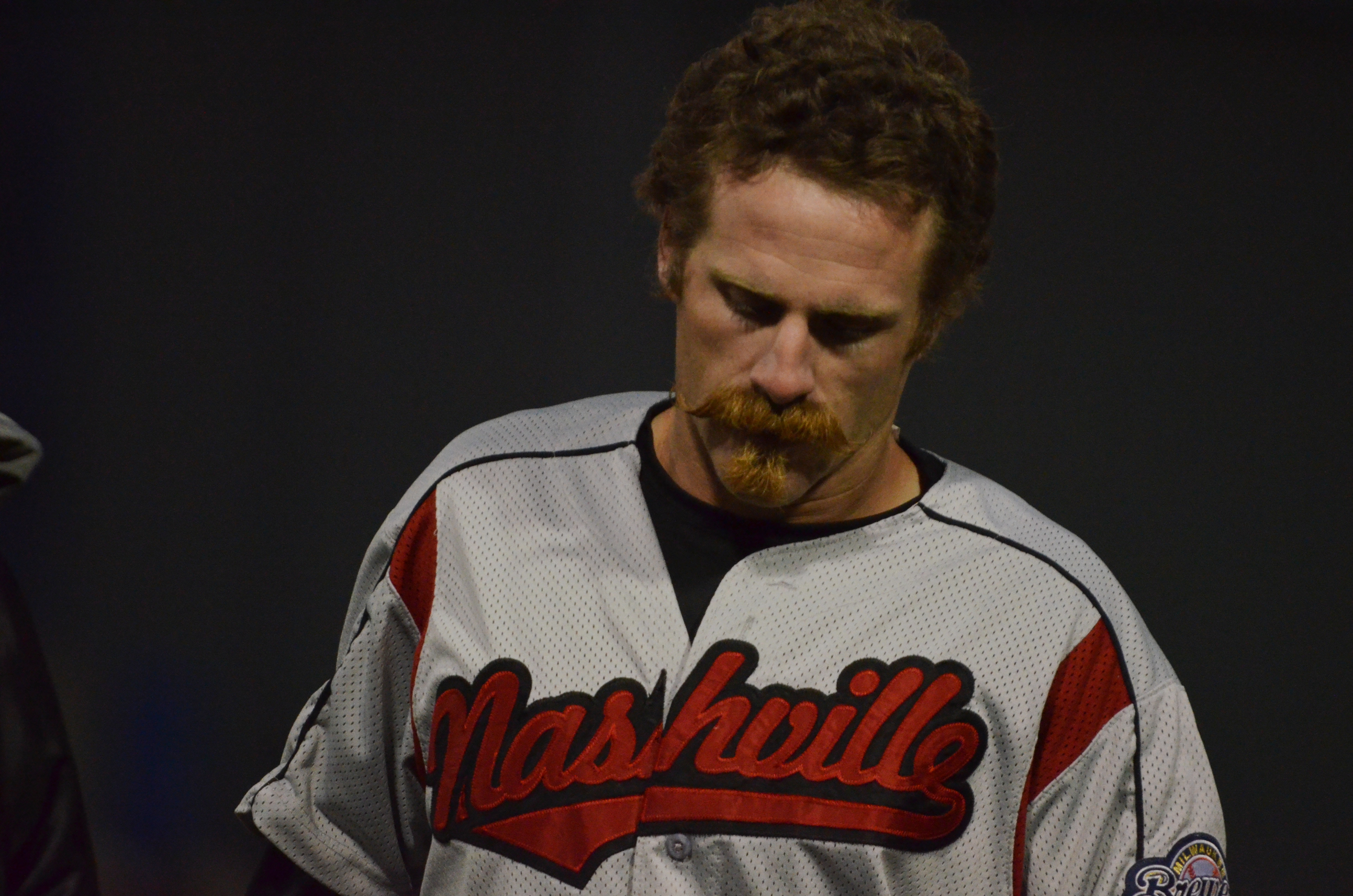 Kevin Mattison